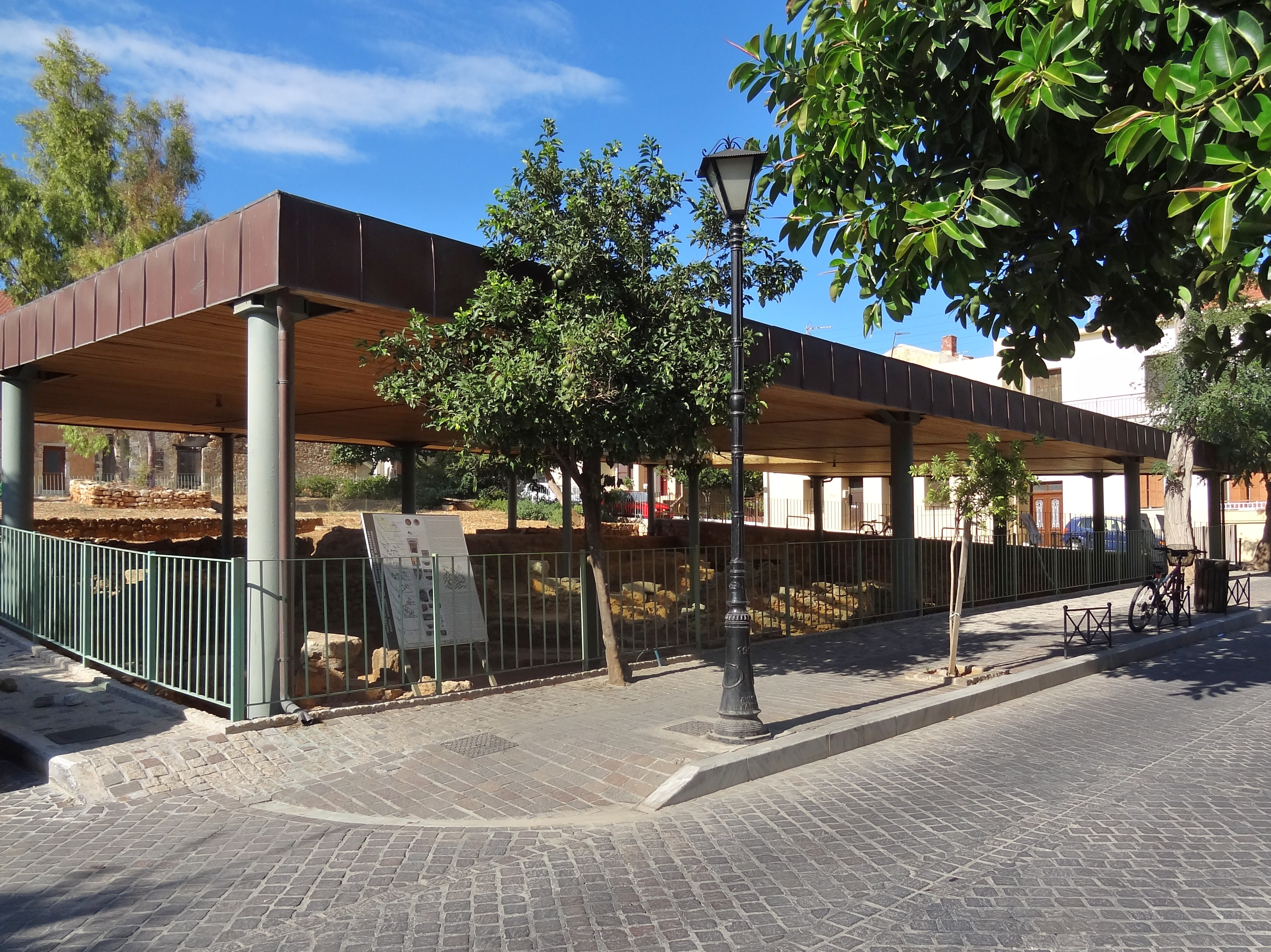 Minoische Ausgrabungen auf dem Kastelli-Hügel in Chania, Gemeinde Chania, Regionalbezirk Chania, Kreta, Griechenland